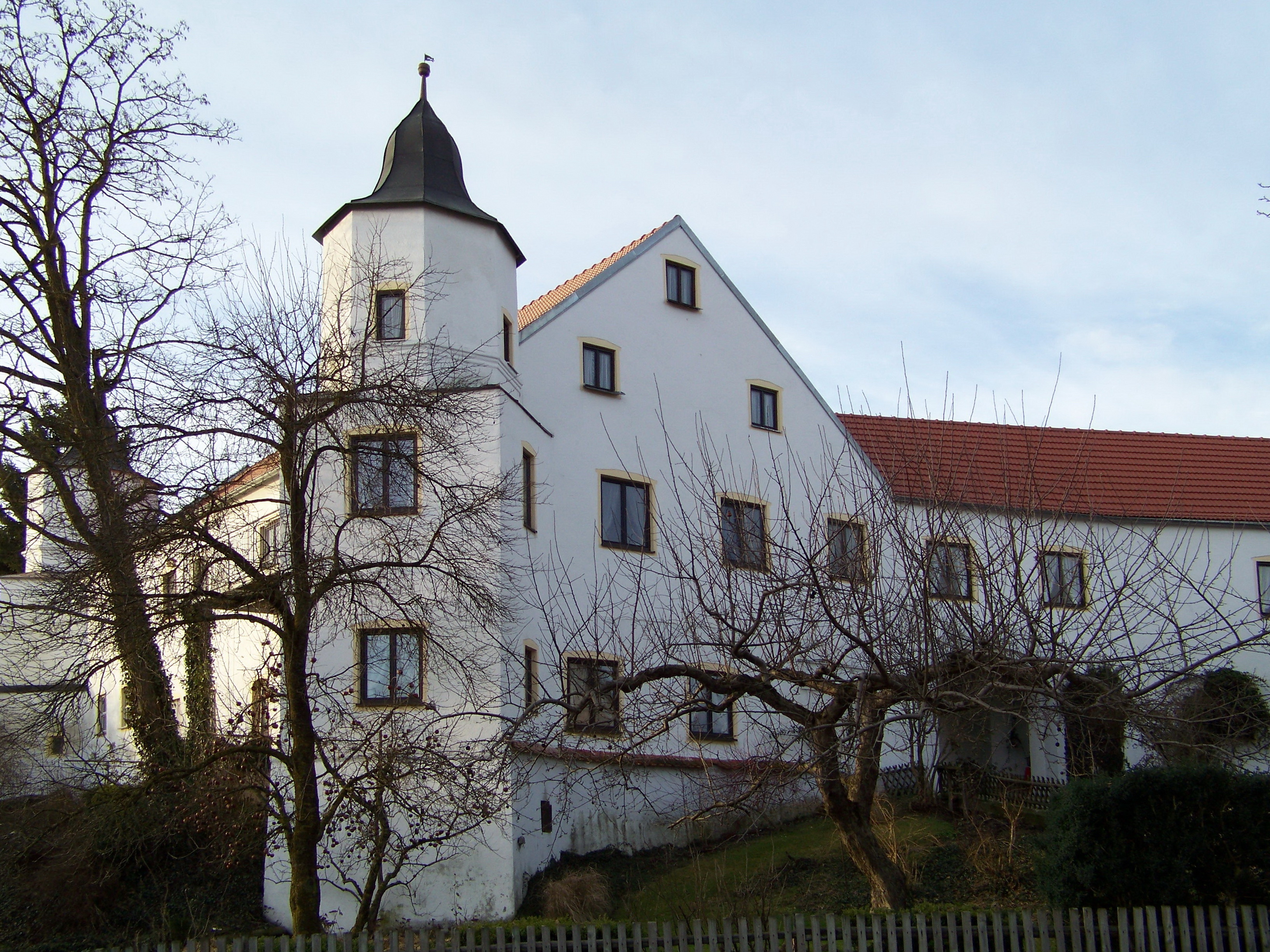 Pfeffenhausen, Niederhornbach, Kirchstrasse 5. Schloss. Dreiflügelanlage über mittelalterlichem Kern, Wiederaufbau 1665; Hauptgebäude mit Satteldach und zwei Ecktürmen, Ostflügel mit Laubengang und Arkaden zum Hof.